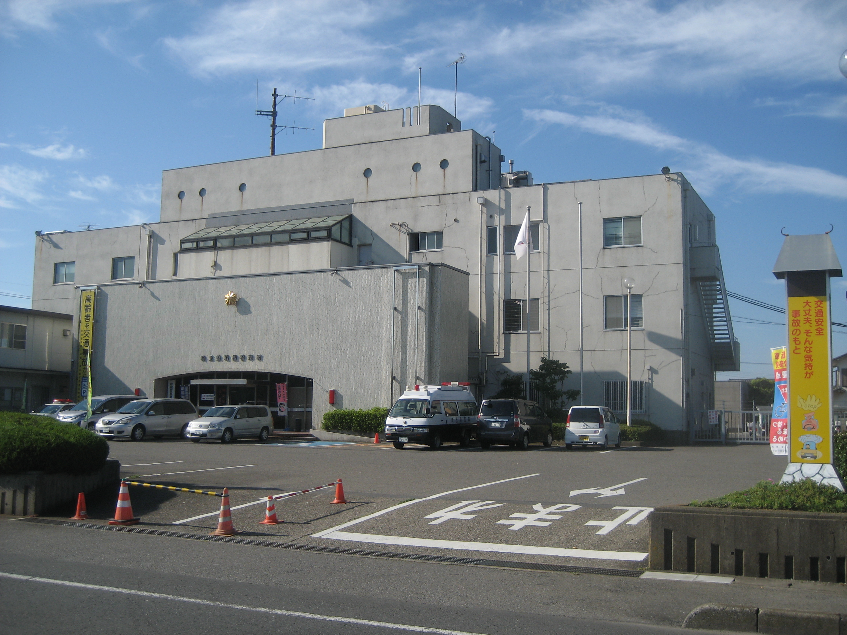 埼玉県岩槻警察署庁舎